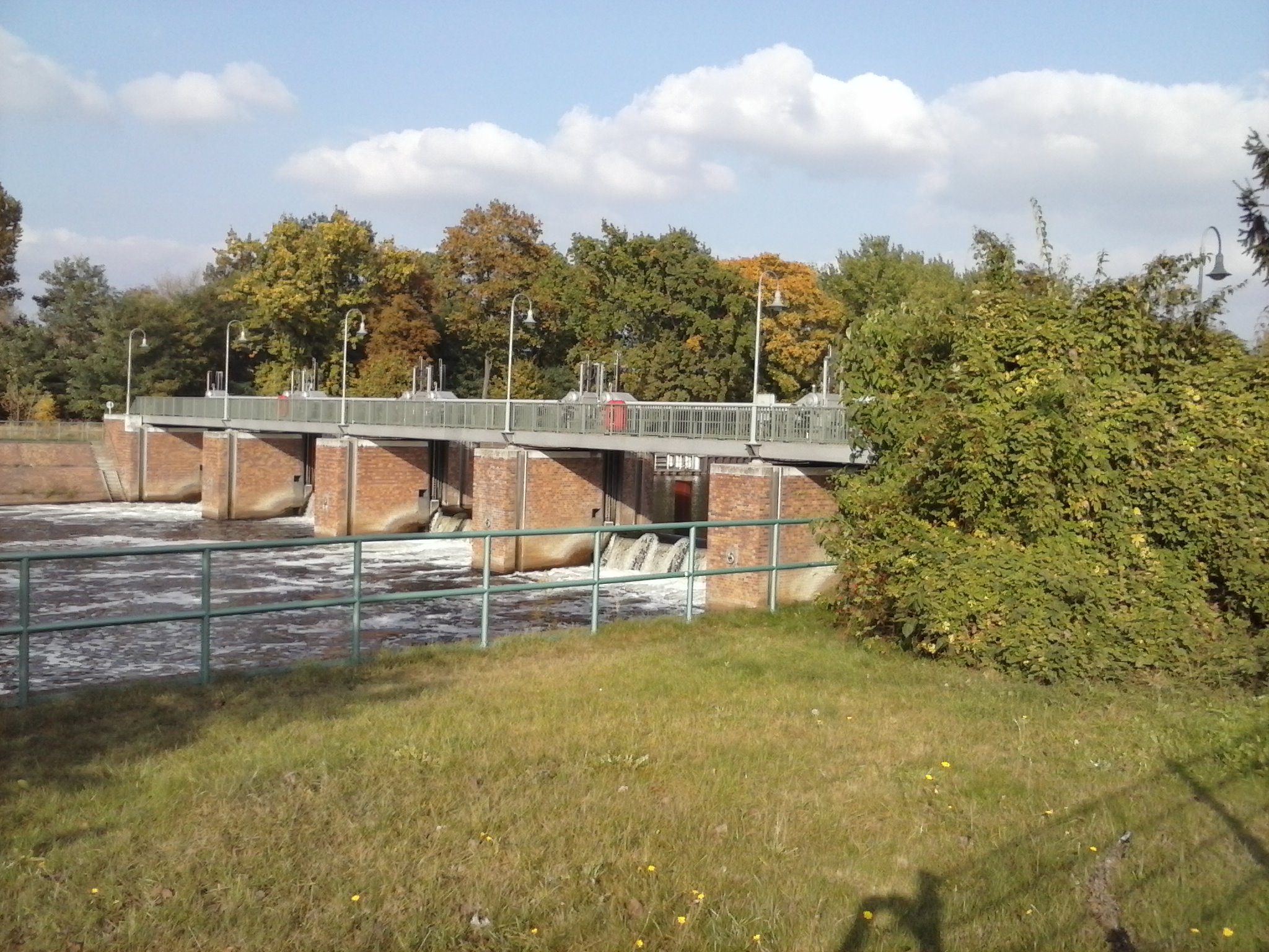 Das Spreewehr an der Schleuse Charlottenburg hält den Wasserstand in der Innenstadt auf dem notwendigen Niveau.